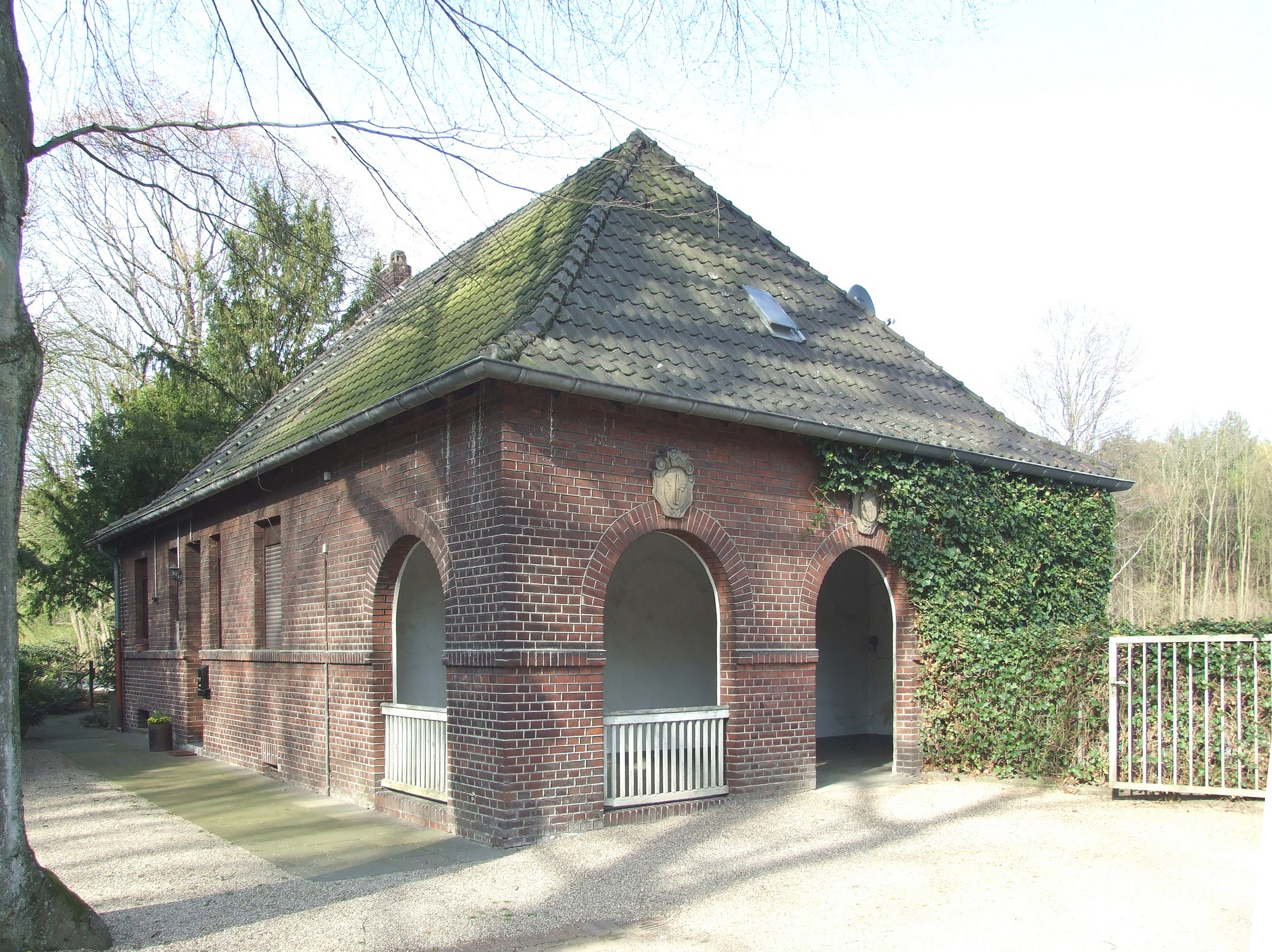 Herne, Waldfriedhof, rechtes Torhaus